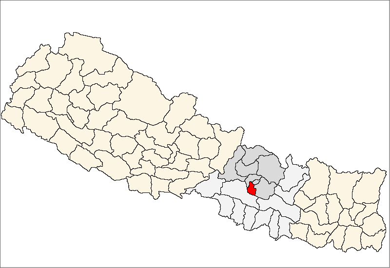 FrenchCarte de localisation dudistrict de Lalitpur(wp-FR),au Népal (wp-FR).EnglishLocation map ofLalitpur District(wp-EN),in Nepal (wp-EN).